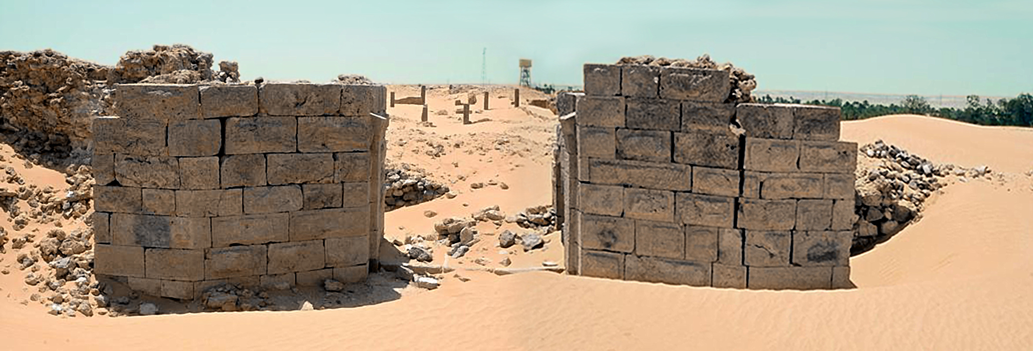 Das Kastell Gholaia, das durch antike Quellen auch als castra Chol(aia), [G]olas sowie in der Tabula Peutingeriana als Chosol überliefert ist, war ein römisches Militärlager, das für Sicherungs- und Überwachungsaufgaben am vorderen Limes Tripolitanus, einem tiefgestaffelten System von Kastellen und Militärposten, in der römischen Provinz Africa proconsularis zuständig war. Das von dem Benutzer Mediatus aus zwei Einzelphotographien zusammengesetzte Bild zeigt den Blick durch das Tor der Porta praetoria ins Innere des Kastells. Deutlich sind die abgeschrägten Wangen der beiden Tortürme sowie das Rustikamauerwerk mit Randschlag zu sehen.